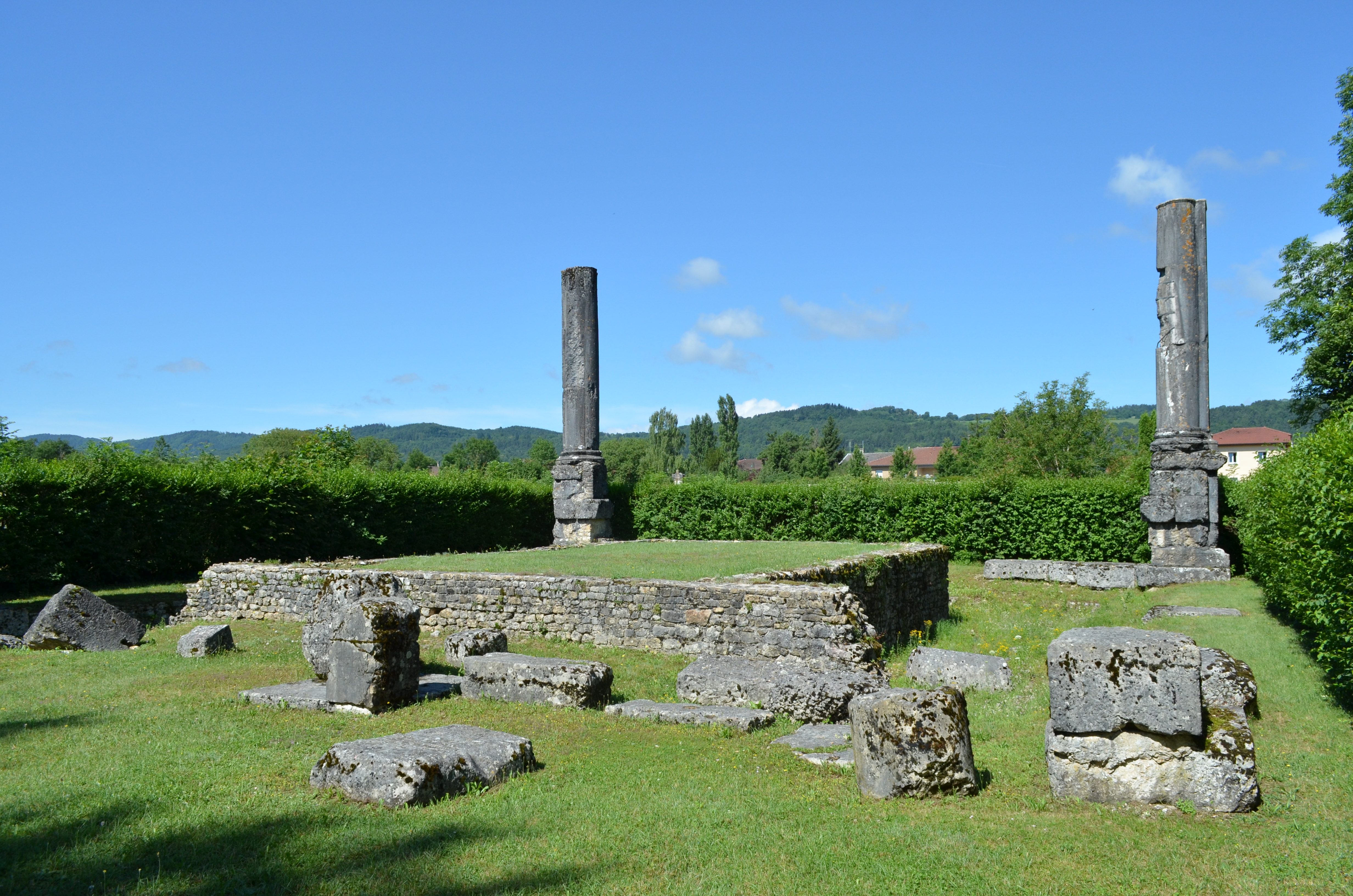 Ruines du temple gallo-romain dédié à Mars ou Mercure à Izernore